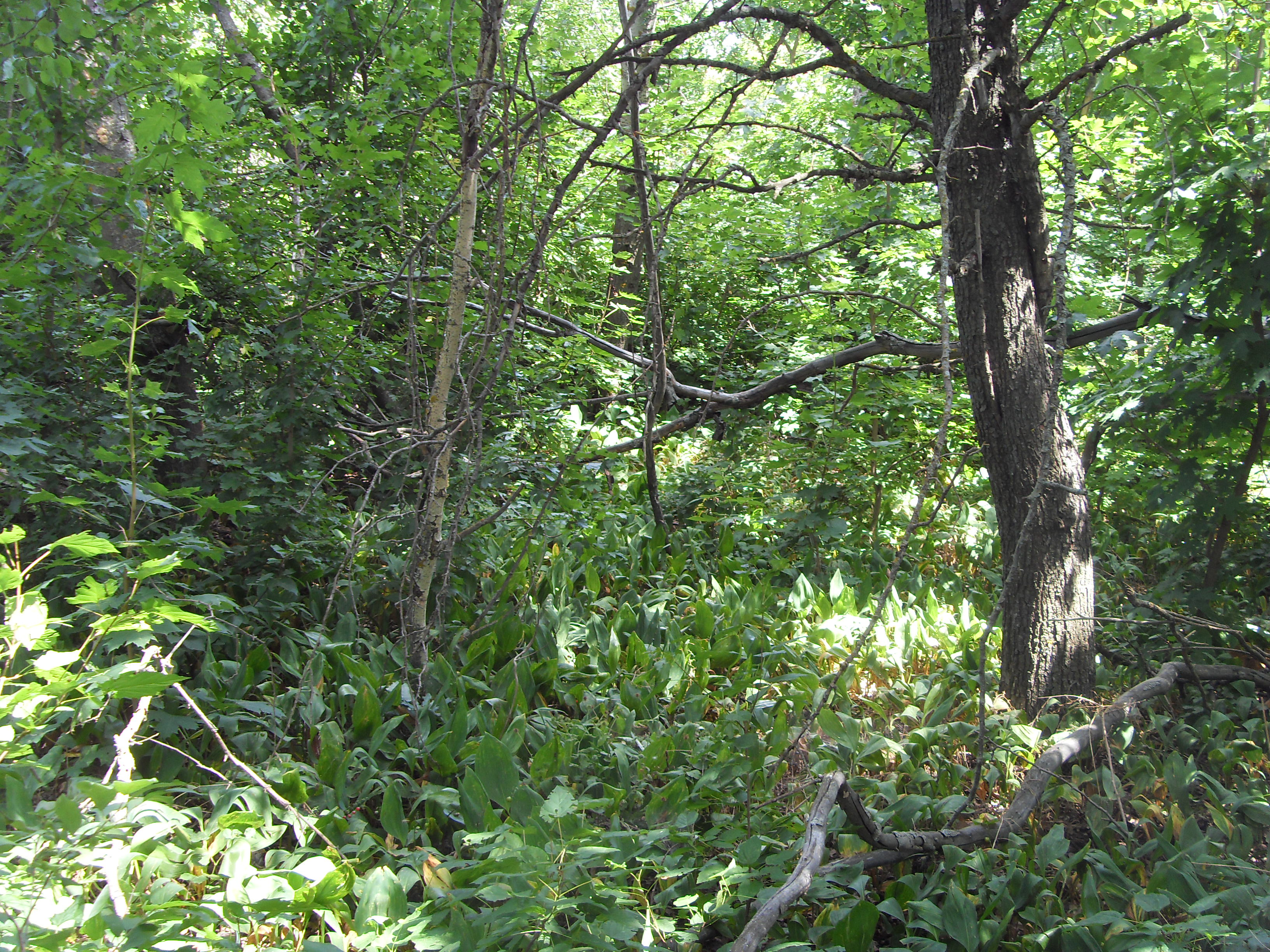 Novokhopyorsky District, Voronezh Oblast, Russia